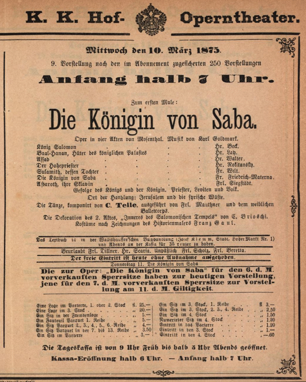 Theaterzettel zur Uraufführung der Oper Die Königin von Saba von Karl Goldmark